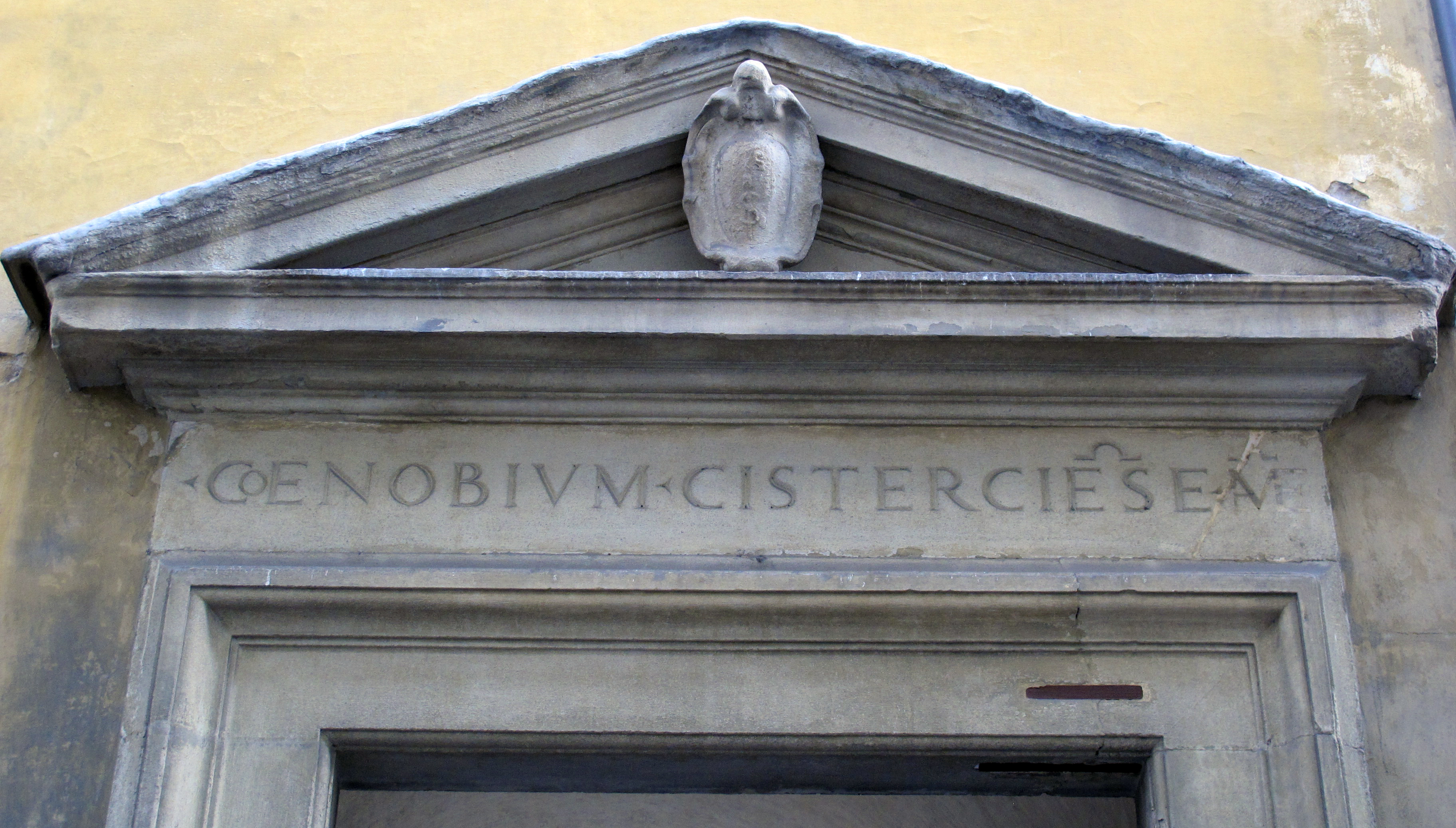 Santa Maria Maddalena de' Pazzi, Firenze